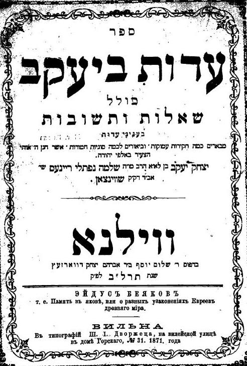 כריכת הספר "עדות ביעקב"